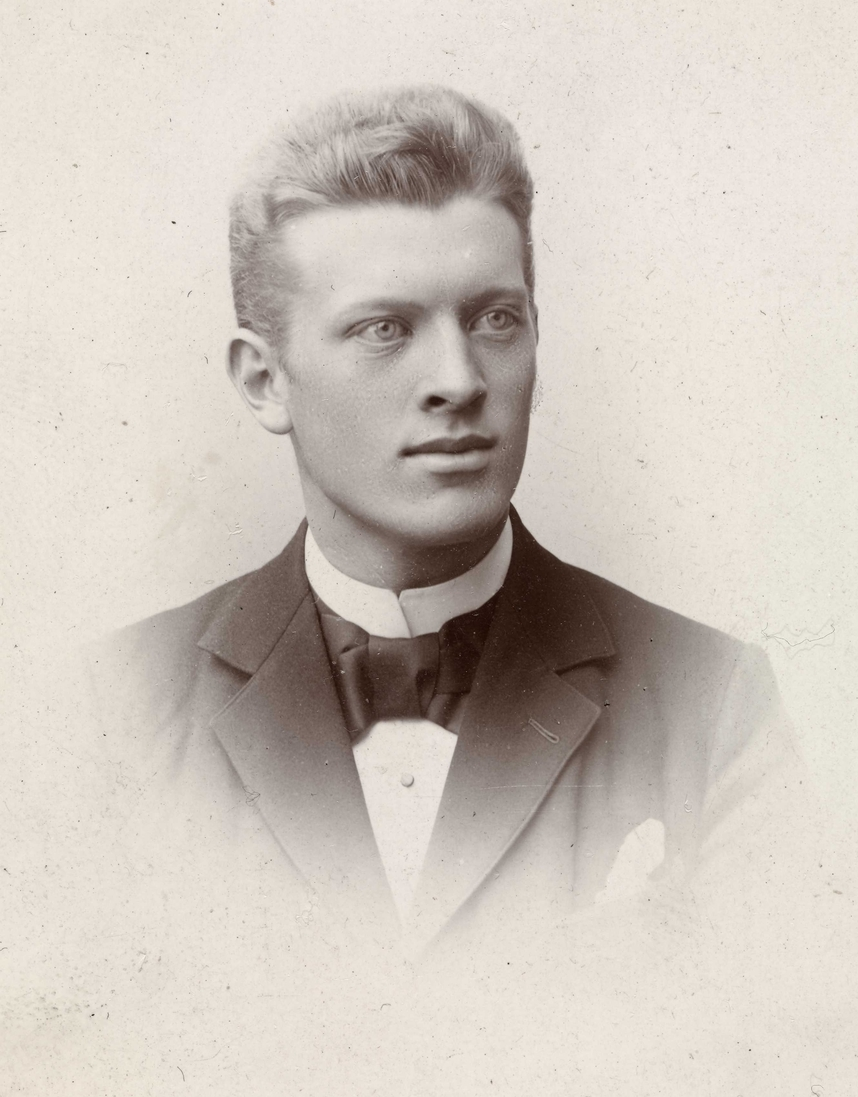 Arkitekt Carl Ferdinand Linthoe fotografert ca. 1900 av L. Szacinski (firma). Fra Byhistorisk samling hos Oslo Museum.